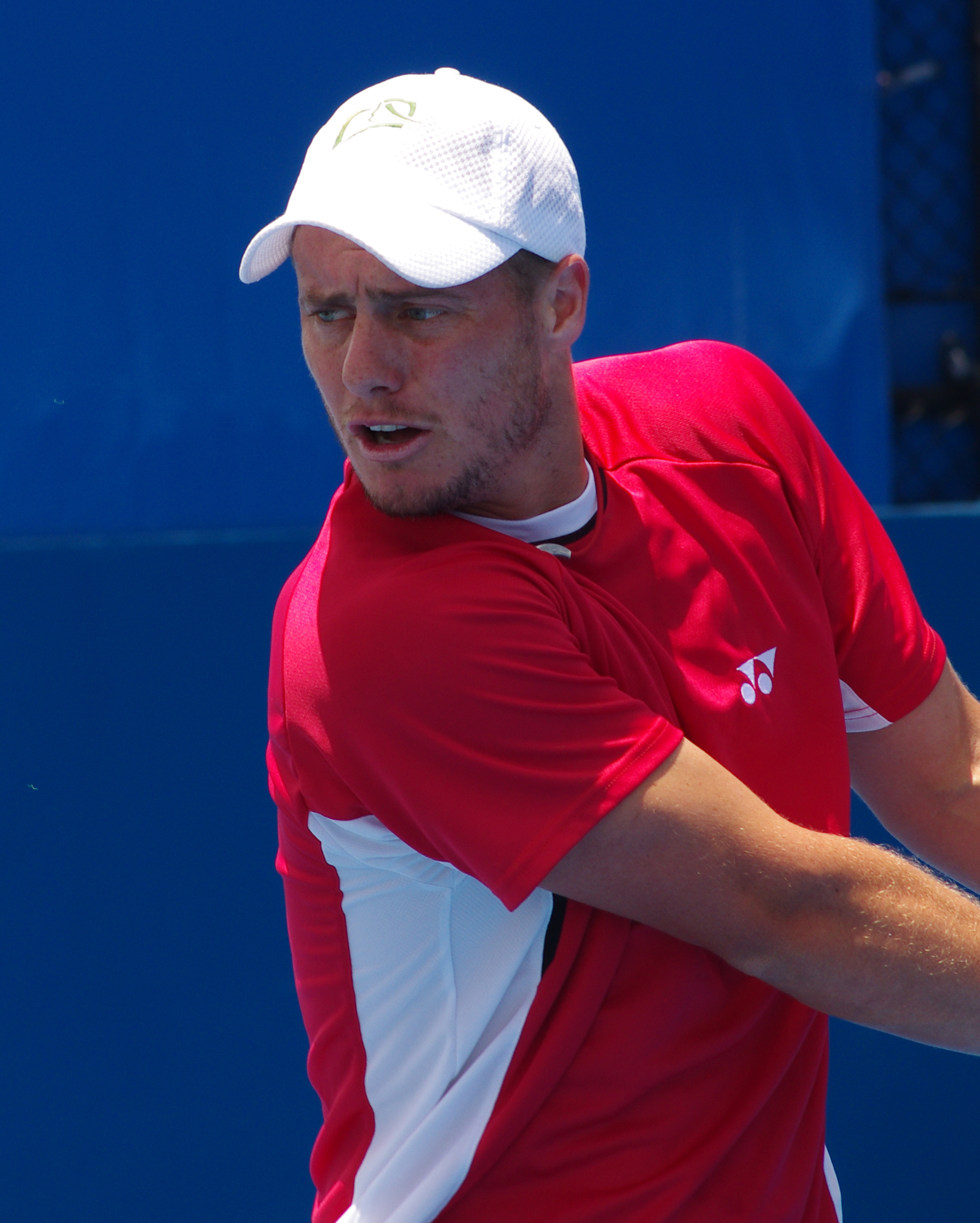 LEYTON HEWITT